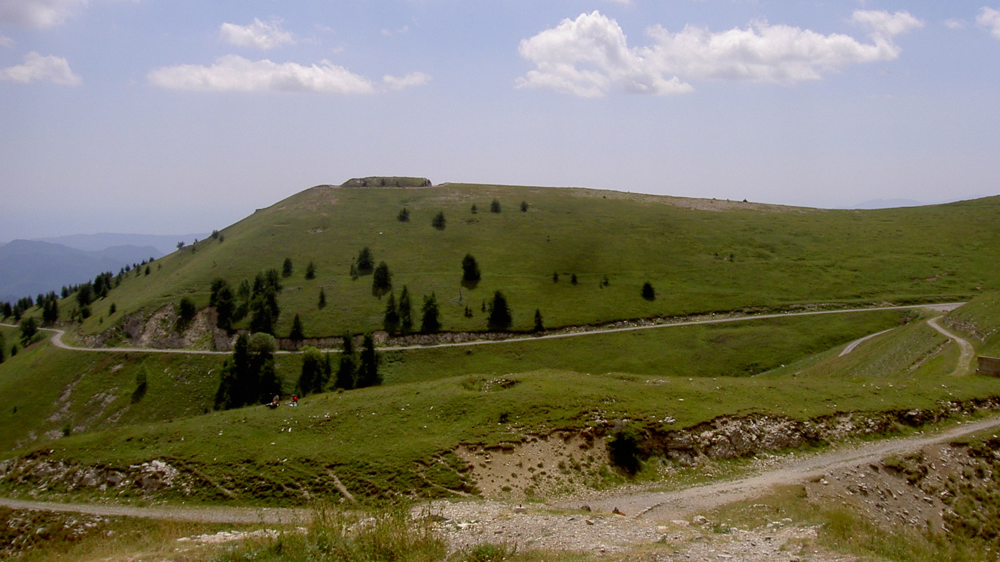 fort de la Forca Authion (2078 m) photo prise par G.Bertothy été 2005